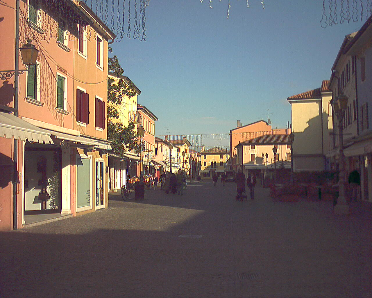 Rio terrà, Caorle.